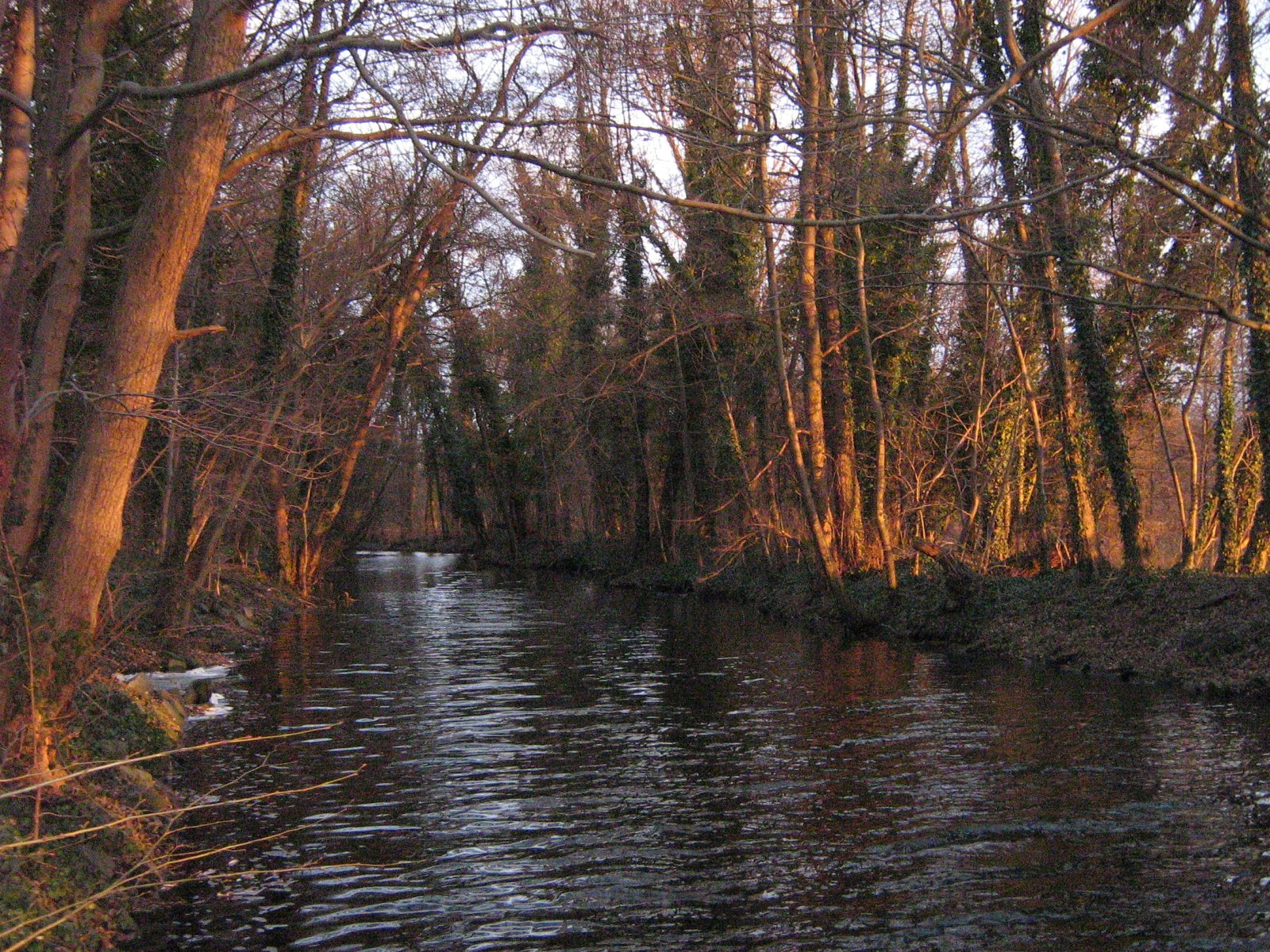 the Wentorfgraben "from Petzinsee to Schwielowsee" (River Havel) in Brandenburg (Germany) - Der Wentorfgraben verbindet den Petzinsee mit dem Schwielowsee. Er liegt im Landkreis Potsdam-Mittelmark, Gemeinde Schwielowsee. Der Wentorfgraben ist i.e.S. ein Umgehungsfließ der Havel